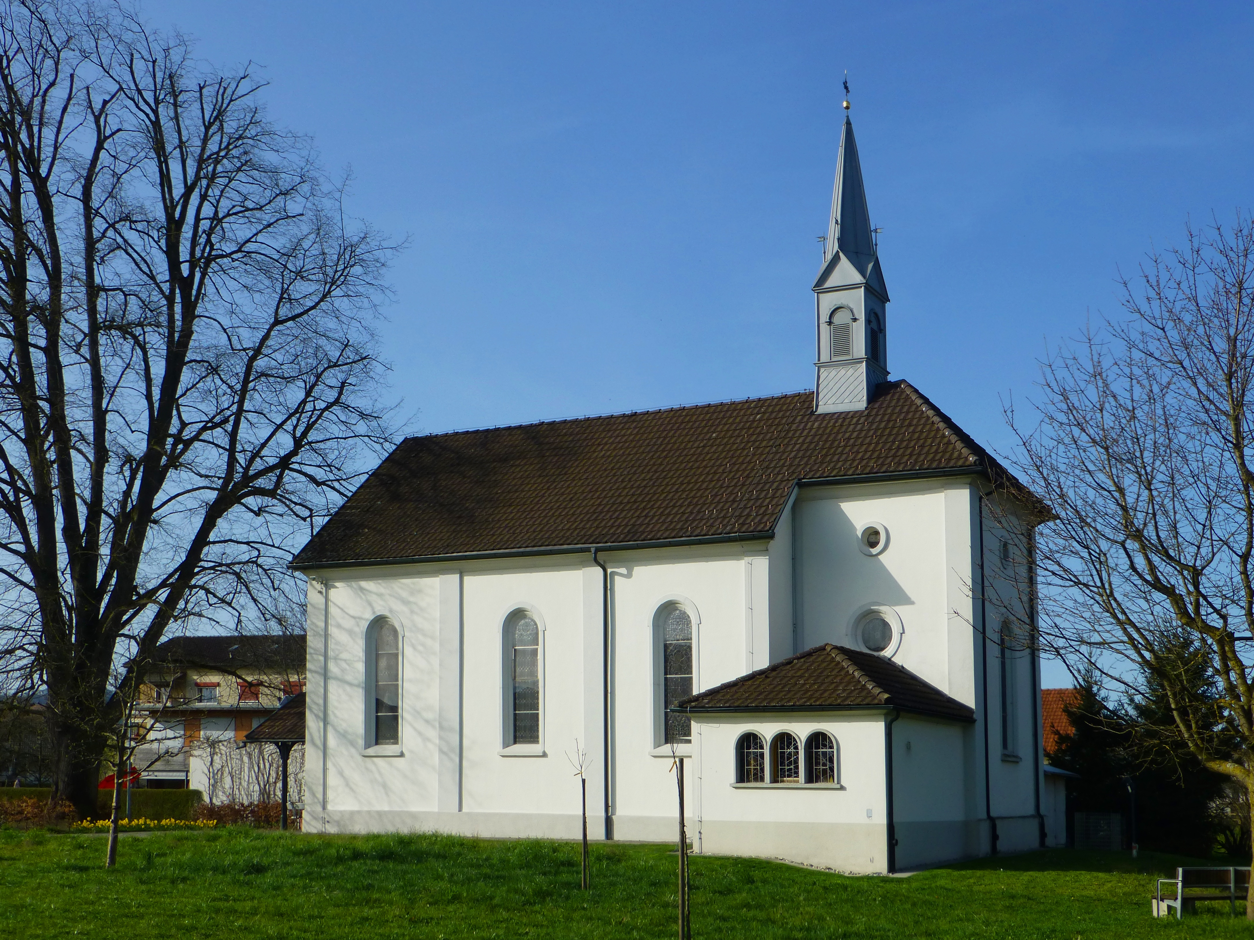 Südostansicht der St. Antoniuskapelle in Lustenau